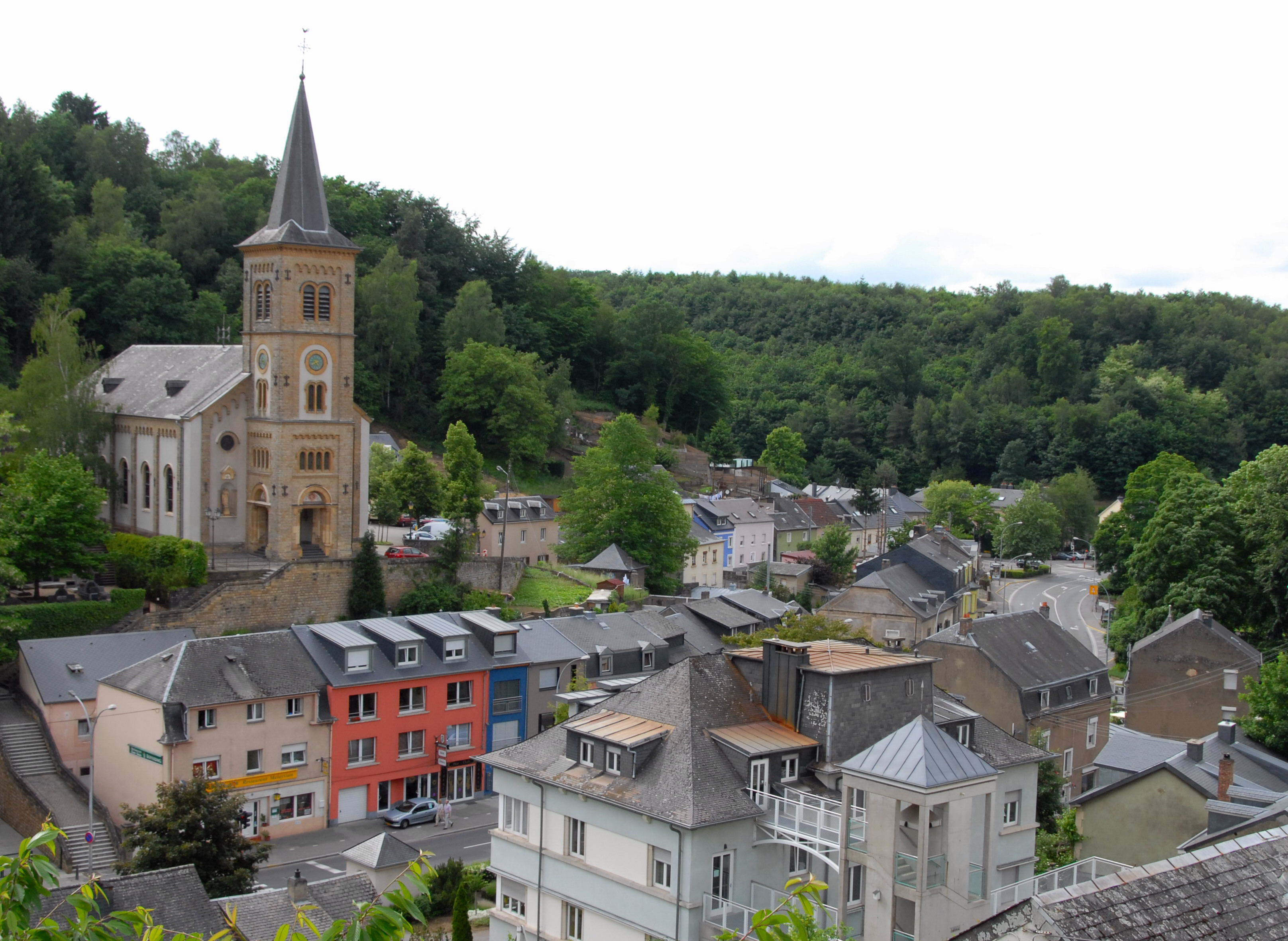 Vue op de Rollengergronn an der Stad Lëtzebuerg (vun der rue des Dormans aus gesinn). Kategorie:Stad Lëtzebuerg Rollengergronn